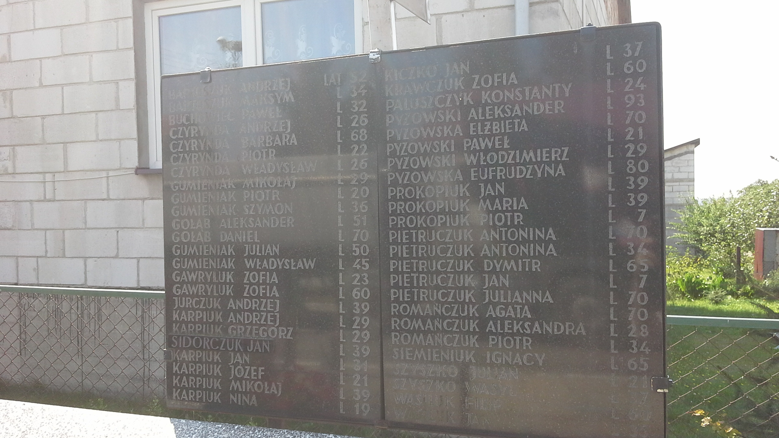 Tablica z nazwiskami ofiar pacyfikacji Słochów Annopolskich, Ogrodnik i Klekotowa, przeprowadzonej w czerwcu 1941 przez hitlerowców